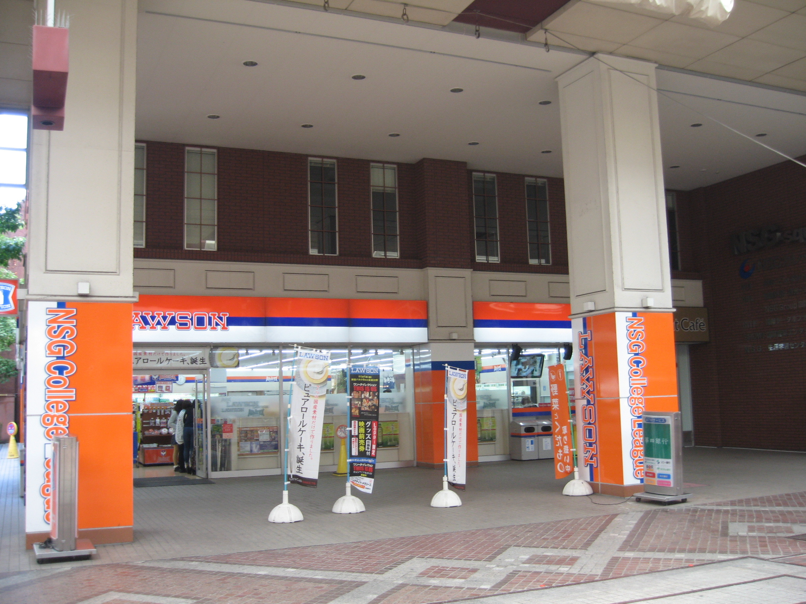 新潟県新潟市中央区。古町通7番町にあるオレンジローソンの画像。